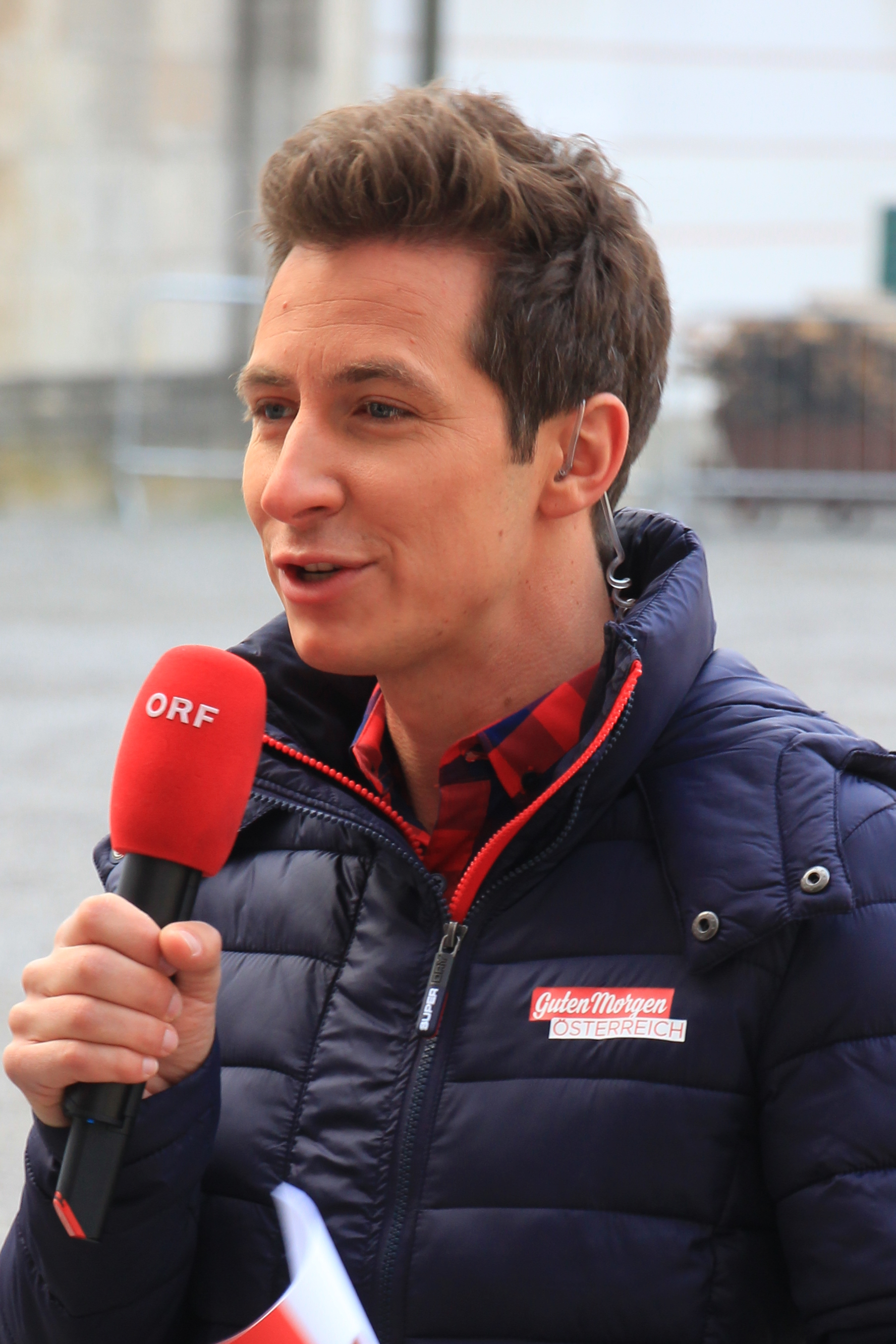 Lukas Schweighofer, Moderator von ORF Salzburg Cropped aus File:Guten-Morgen-Heiligenkreuz 3303.JPG